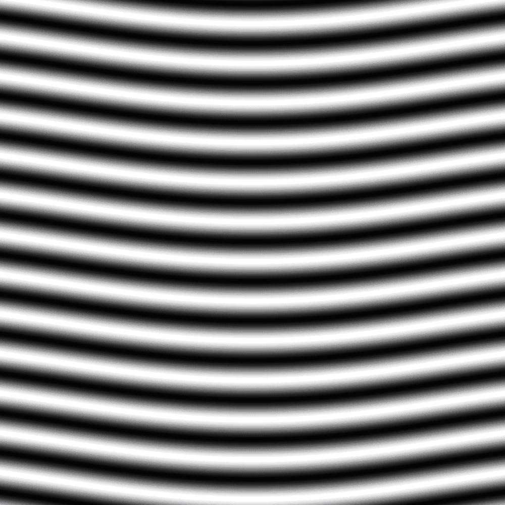 Anillos de interferencia observados a través de un interferómetro (generados por PC, autor: Mirko Serra)